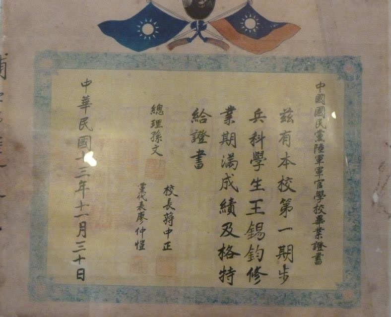 1924年11月30日黃埔軍校畢業證書